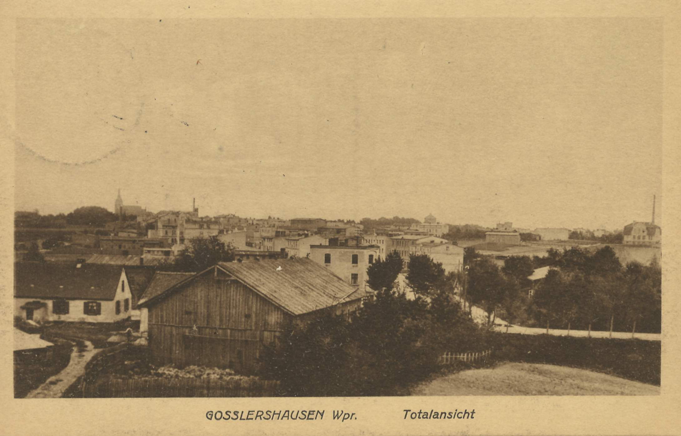 Stadtansicht